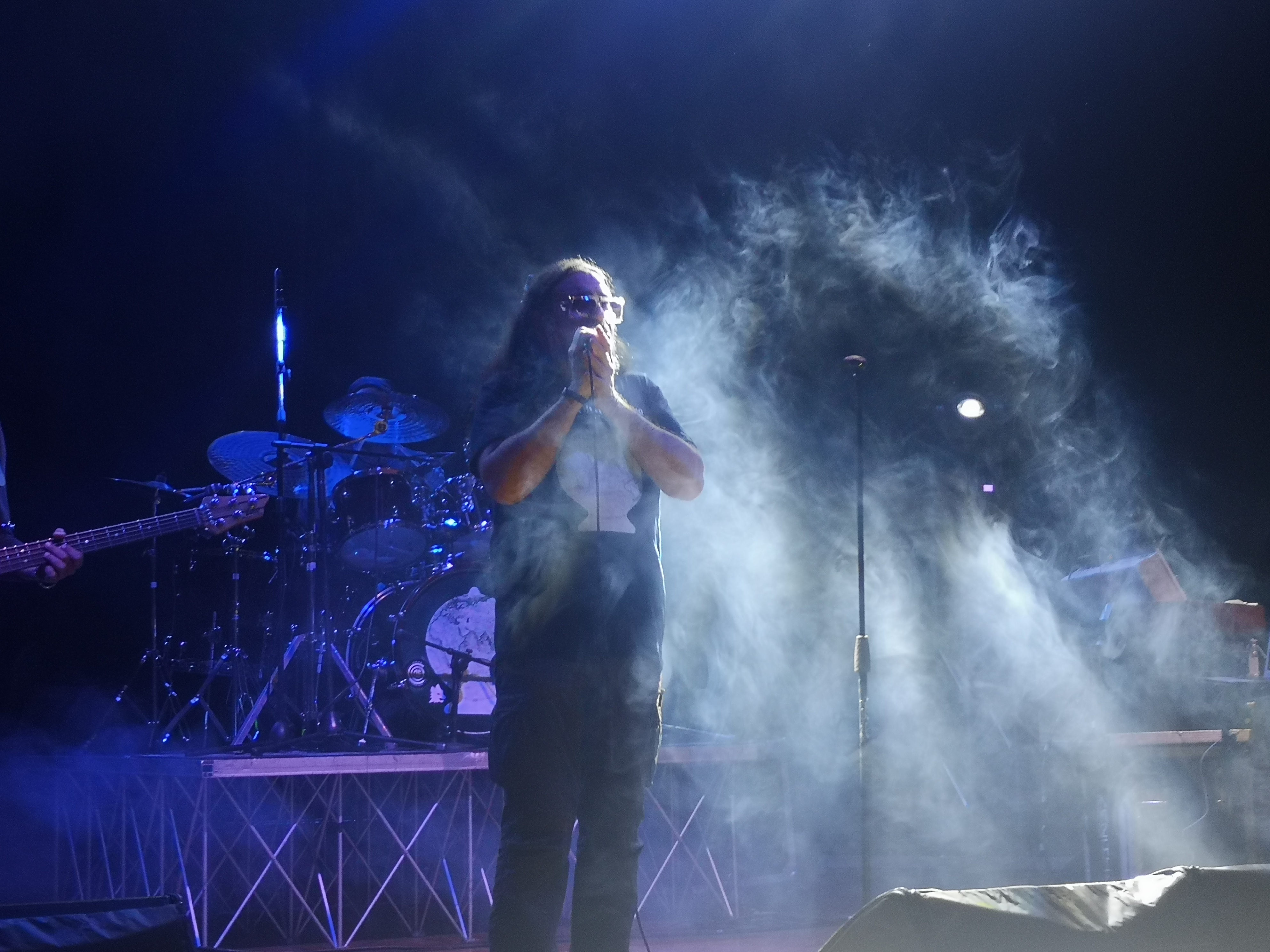 Tony D'Alessio del Banco del Mutuo Soccorso in concerto presso il Teatro Dal Verme di Milano l'8 novembre 2019